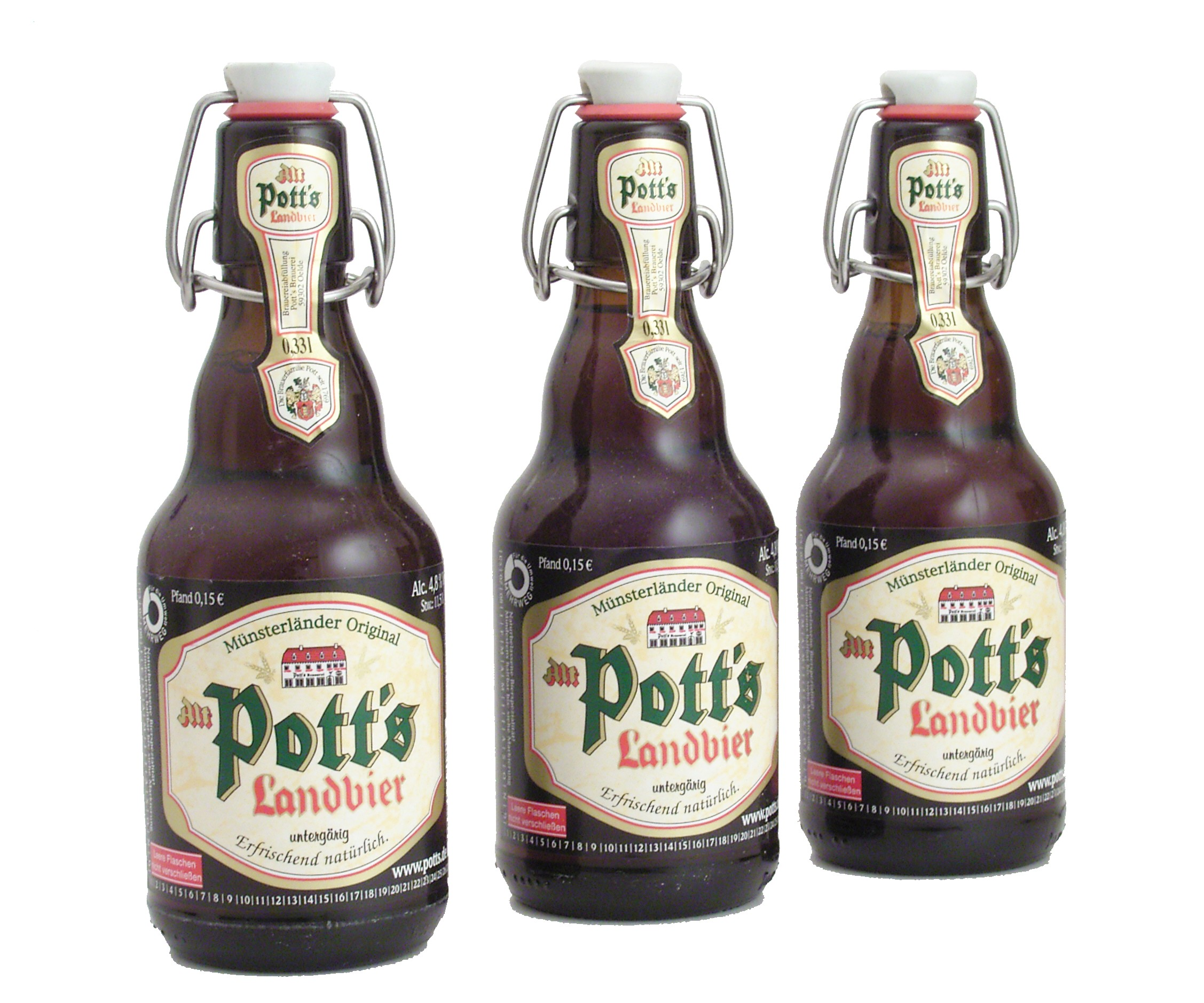 Pottspullen